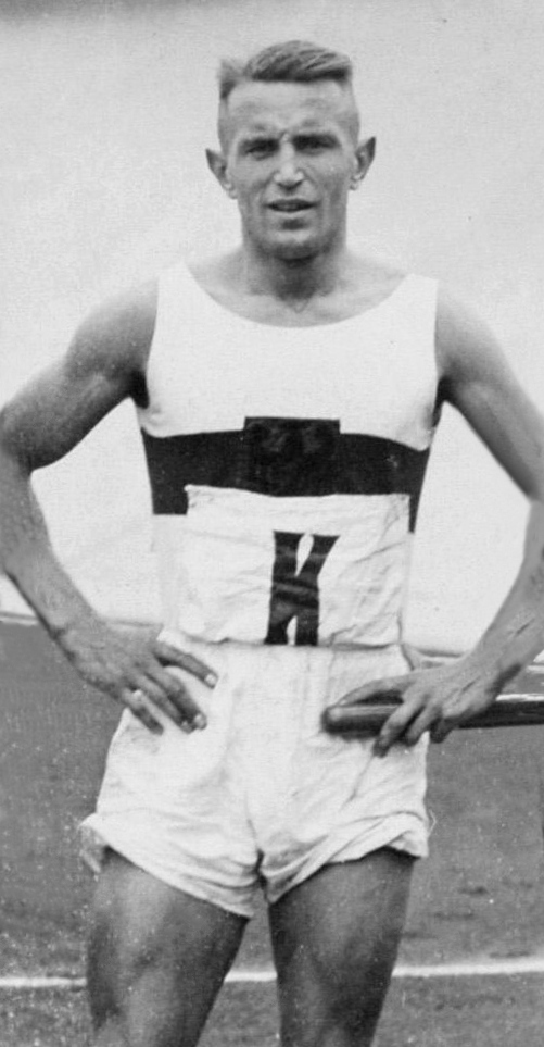 Sport. Olympische Spelen 1928 Amsterdam, Nederland : Otto Neumann.